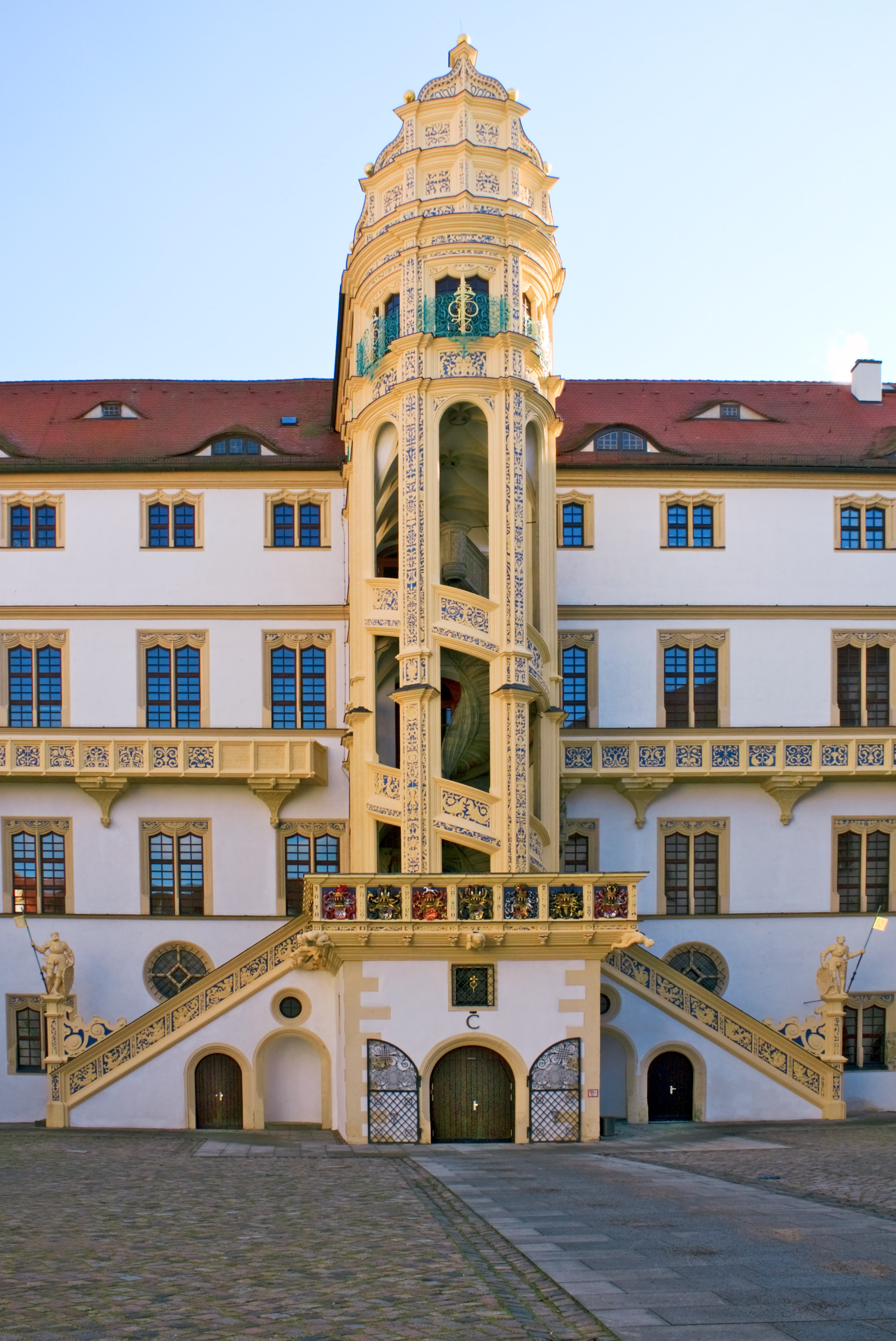 Torgau, Schloss Hartenfels Großer Wendelstein am Johann-Friedrich-Bau.